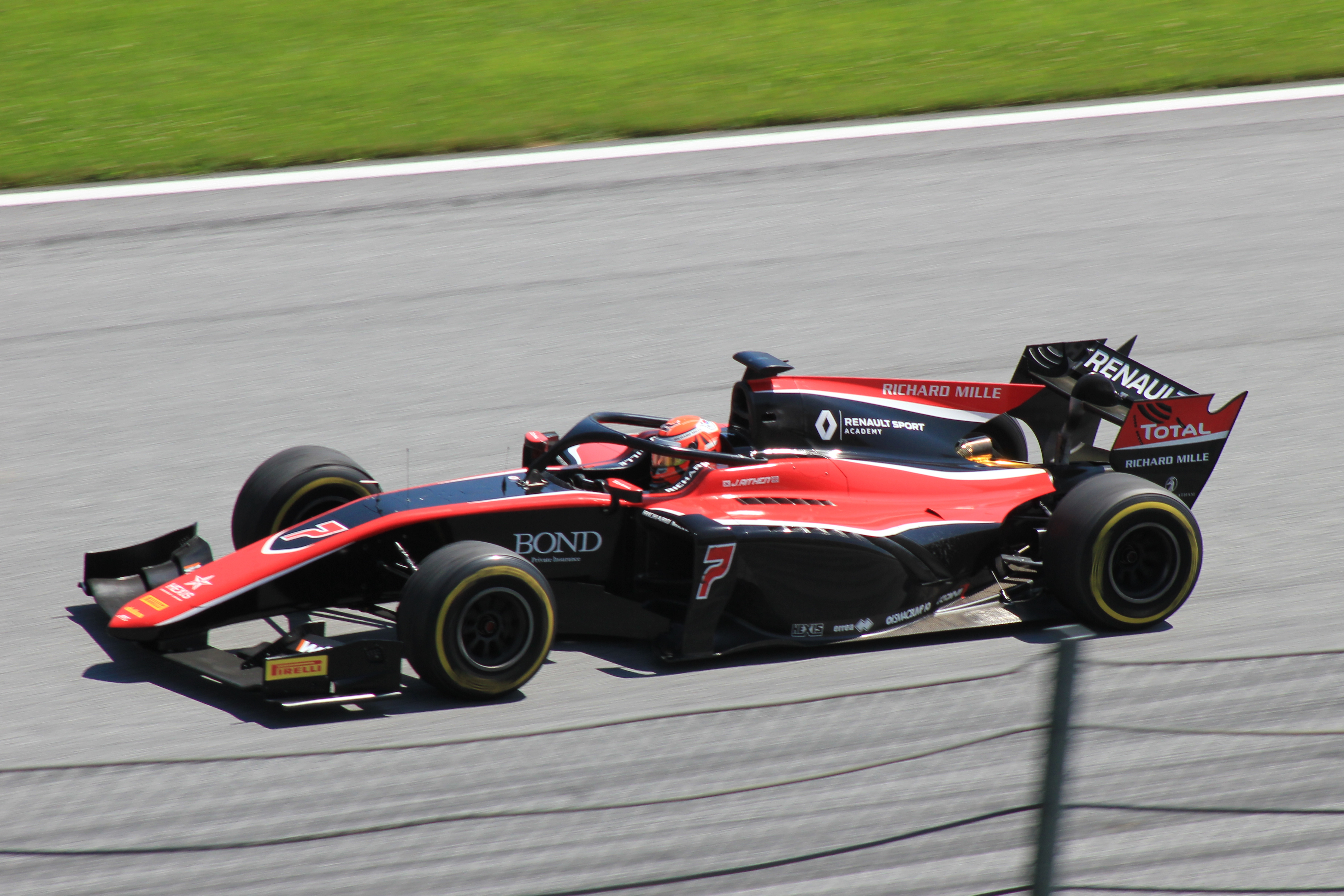 07 Jack Aitken beim Rennwochenende in Österreich 2018 (3)